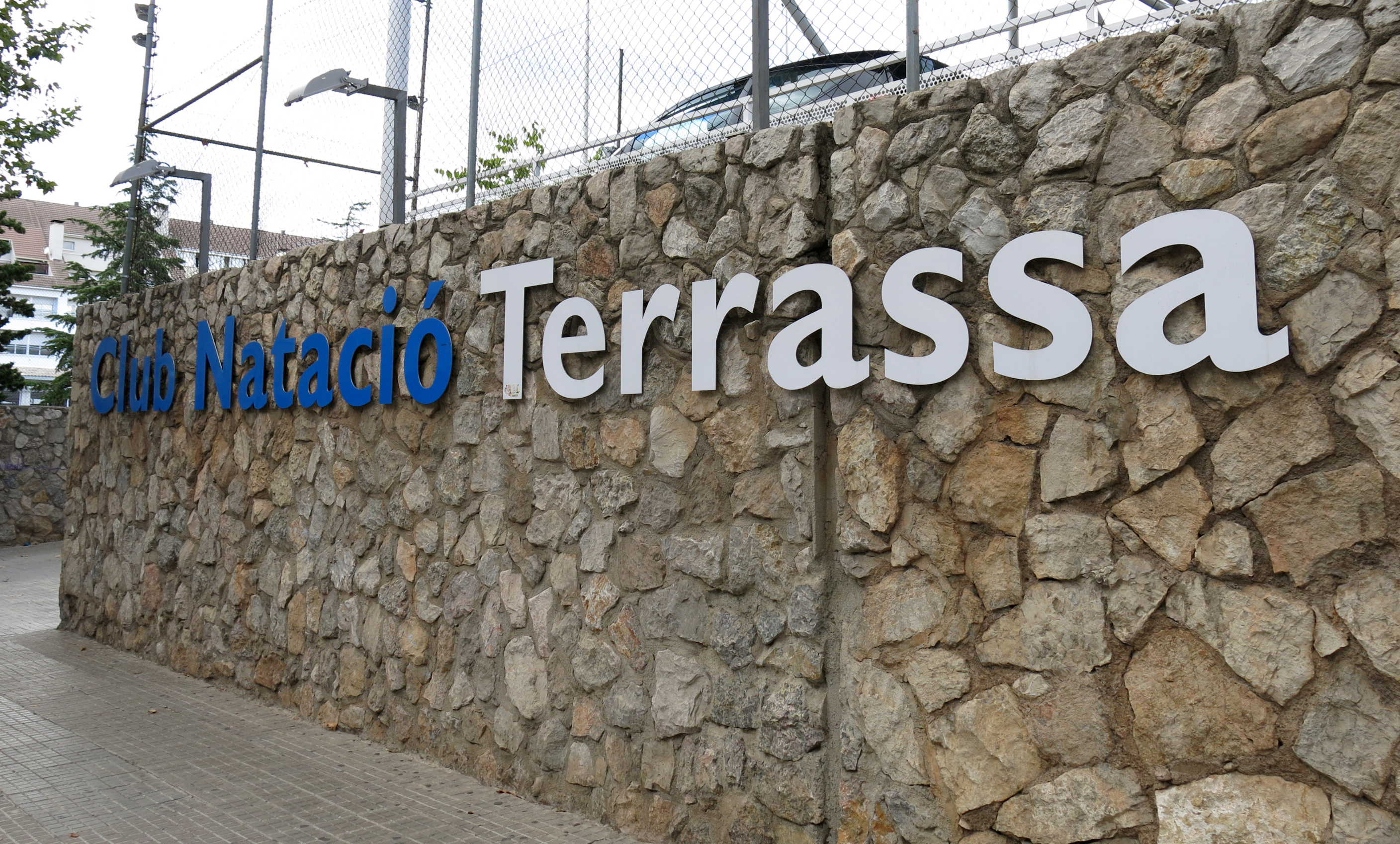 Club Natació Terrassa, av. Abat Marcet